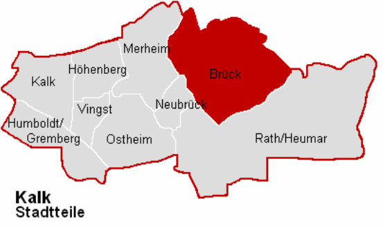 Lagekarte Brück im Stadtbezirk Köln-Kalk